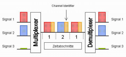 Schematische Darstellung des asynchronen Zeitmultiplexverfahren